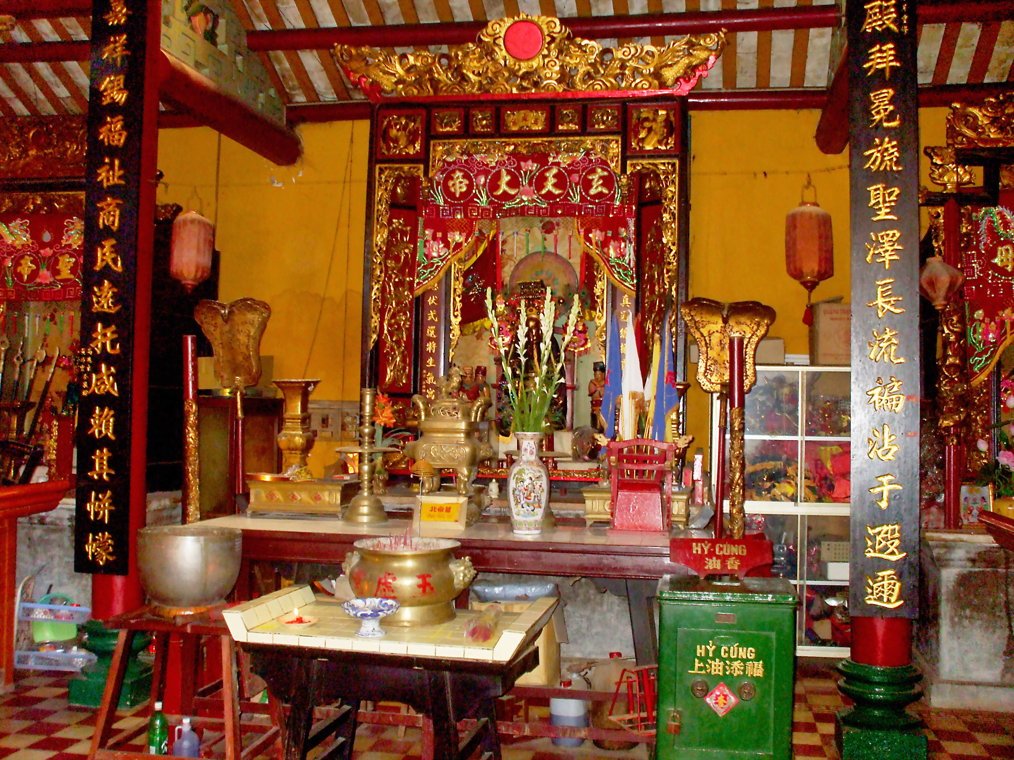 Bàn thờ Bắc Đế trong chùa Ông Bắc ở thành phố Long Xuyên (An Giang, Việt Nam) .